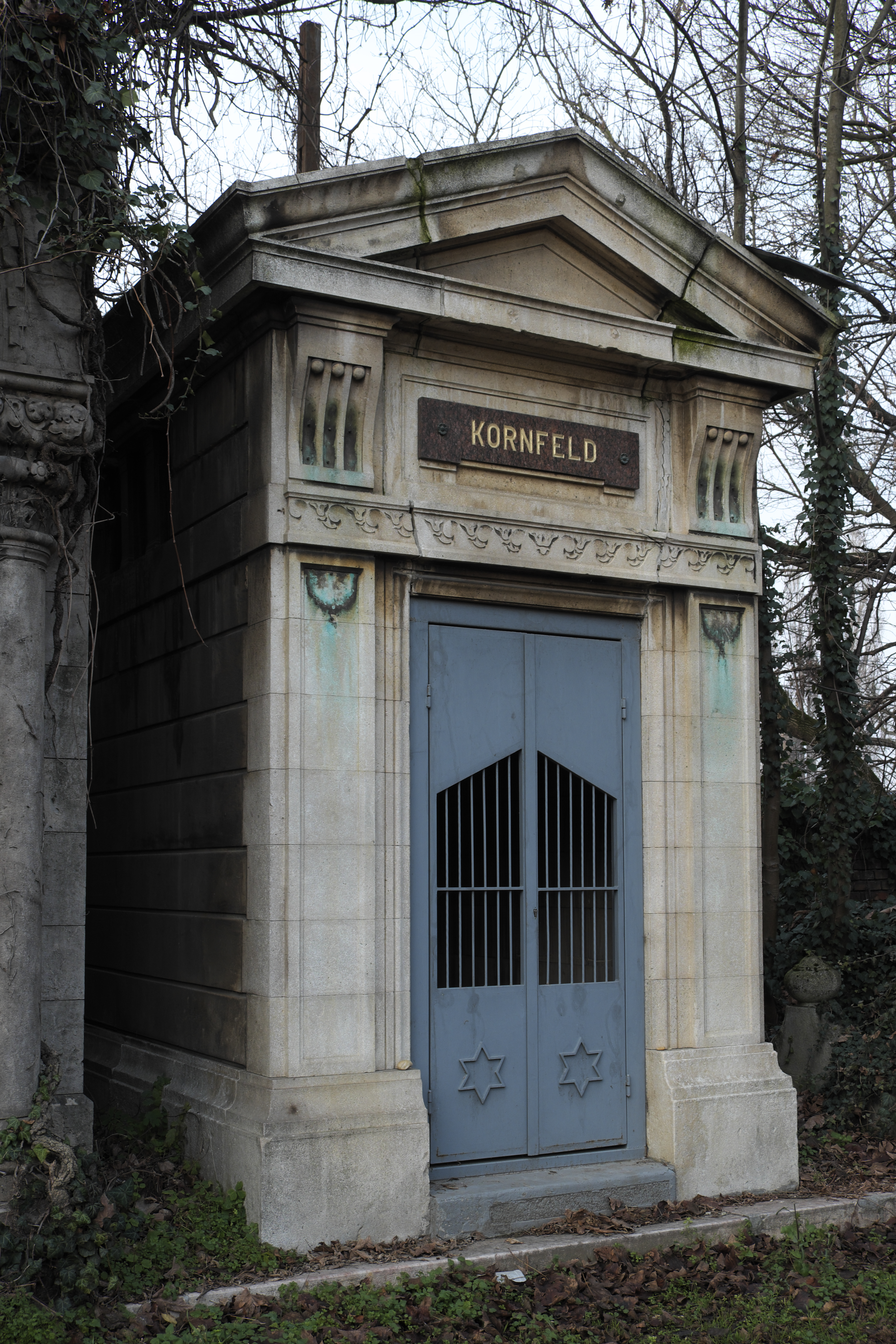 Jüdischer Friedhof an der Kozma utca in Budapest in Ungarn, Mausoleum der Familie Kornfeld